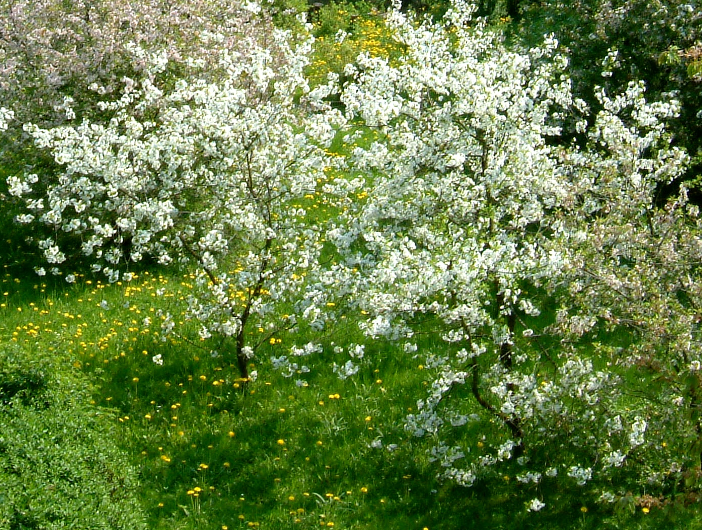 Sauerkirschblüte